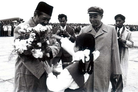 中国国务院总理周恩来在北京机场欢迎印度尼西亚总理阿里·沙斯特罗阿米佐约。